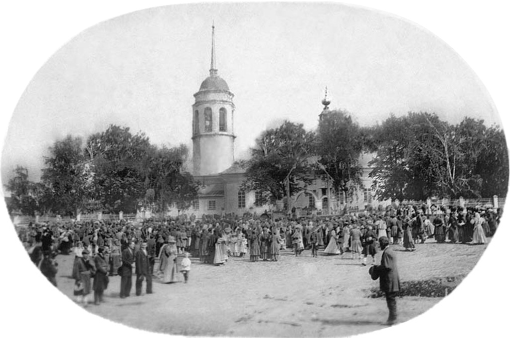 Празднование «Девятой пятницы» (1900 год) Место съемки: Пермская губ., с.Кудымкор, Усольский тракт Источник: ГКБУК «Коми-Пермяцкий краеведческий музей им. П. И. Субботина-Пермяка»